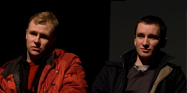 Петр Быстров и Алексей Булдаков